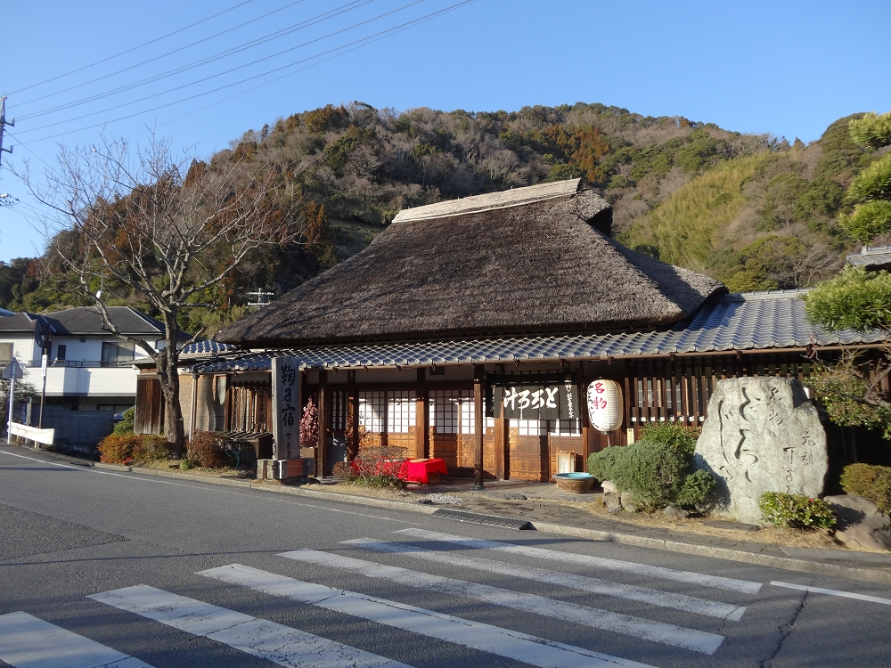 丸子宿丁子屋